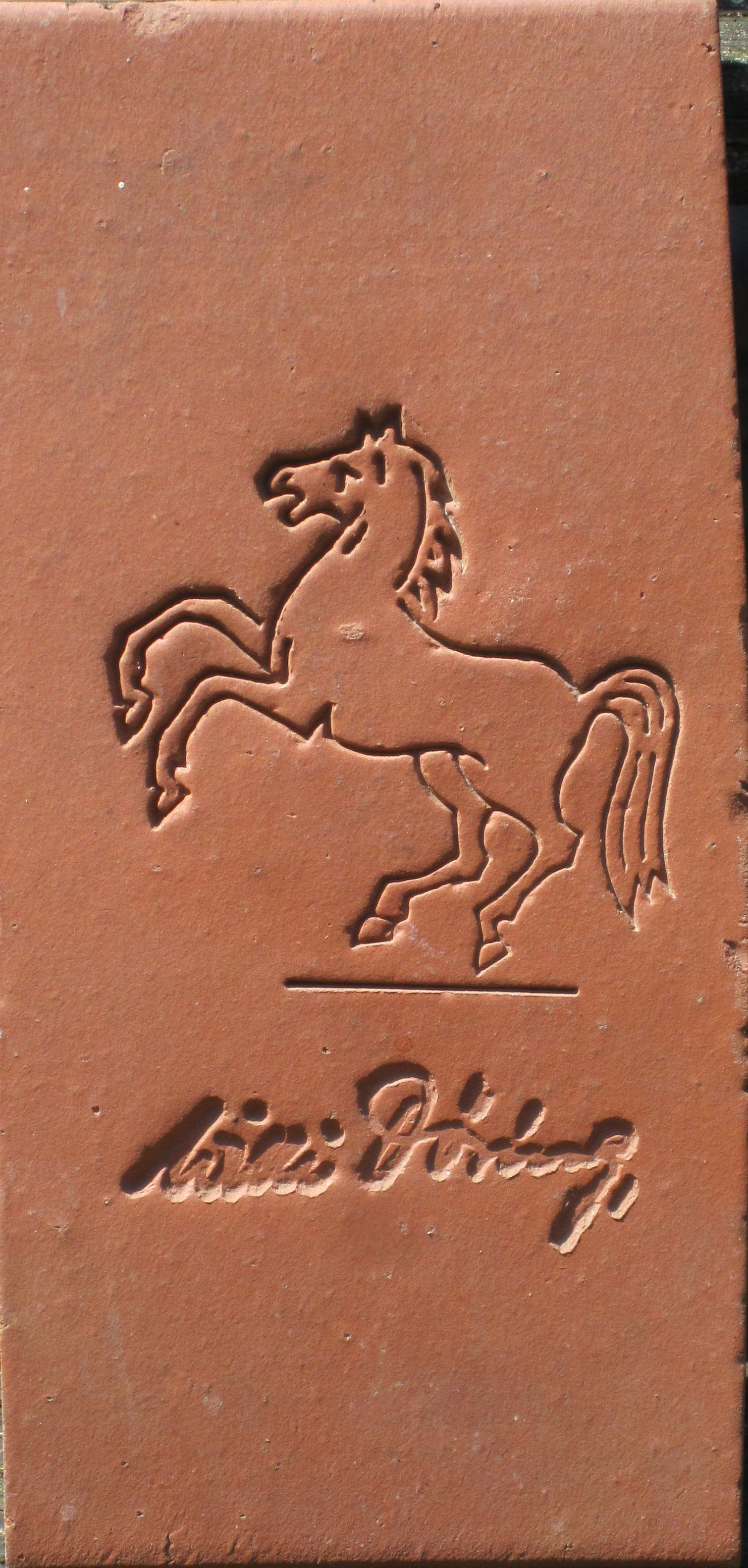 Willi Döring, niedersächsischer Landtagsabgeordneter (1967-1994) aus Gieboldehausen, pflegte immer in der Vorweihnachtszeit Kolleginnen und Kollegen, Beschäftigten der Landtagsverwaltung, Mitarbeitern seiner Fraktion, aber auch denen anderer Fraktionen sorgfältig überlegte und manchmal extra für diesen Zweck hergestellte Aufmerksamkeiten zu dedizieren. Im Dezember 1989 überreichte er den von ihm ausgewählten Empfängern eine rote Tonkachel von 12 mal 24 Zentimetern, in die er vor dem Brennen ein Niedersachsenross und den faksimilierten Namenszug „Willi Döring“ hatte drücken lassen.